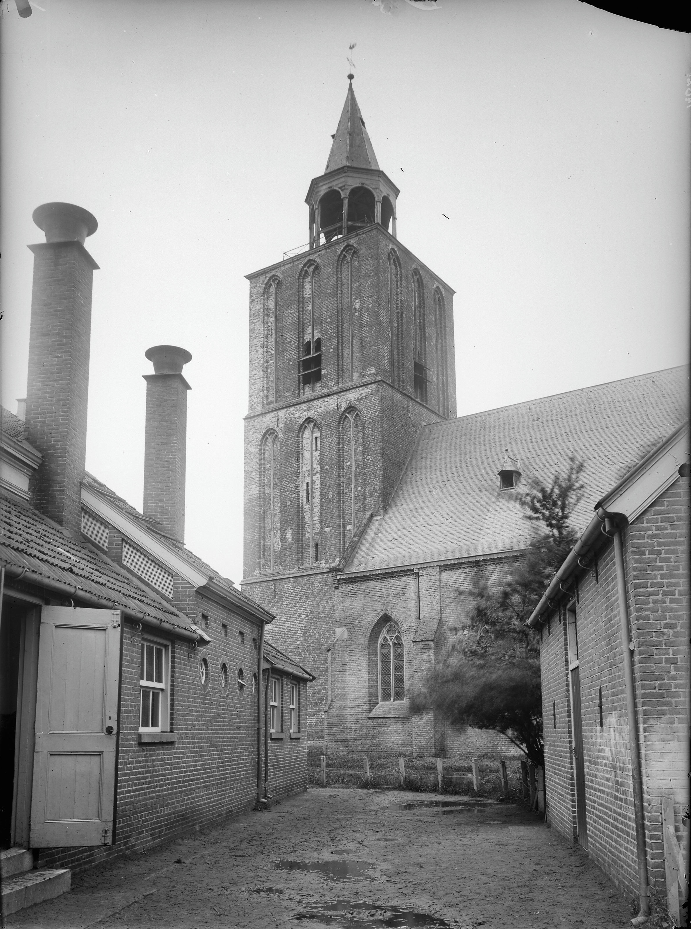 Nederlands Hervormde Kerk en Toren: Toren